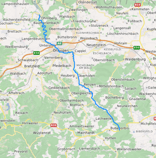 carte réalisée sur umap This map may be incomplete, and may contain errors. Don't rely solely on it for navigation.